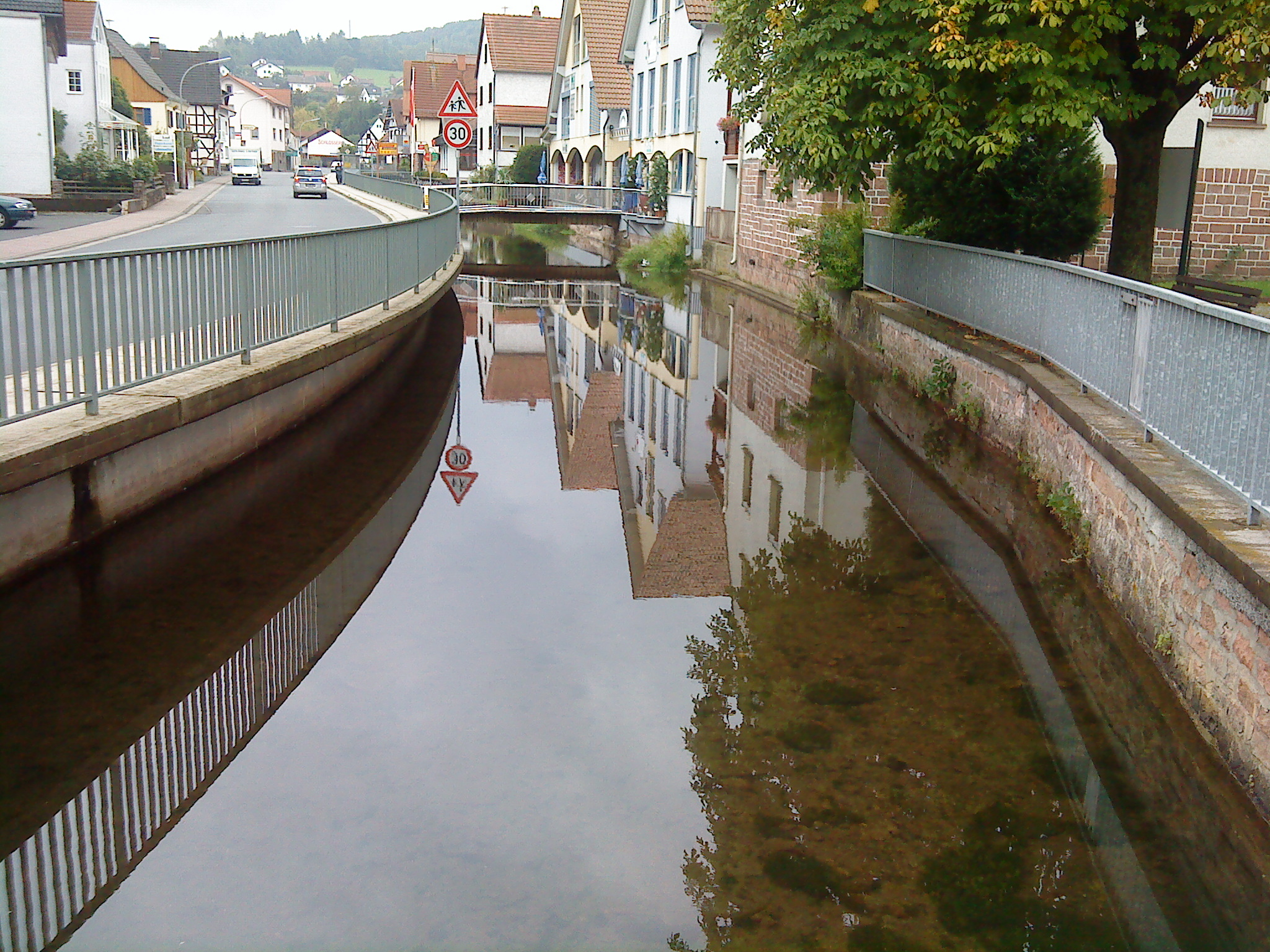 Die Jossa in Oberndorf mit Eiscafe auf Brücke